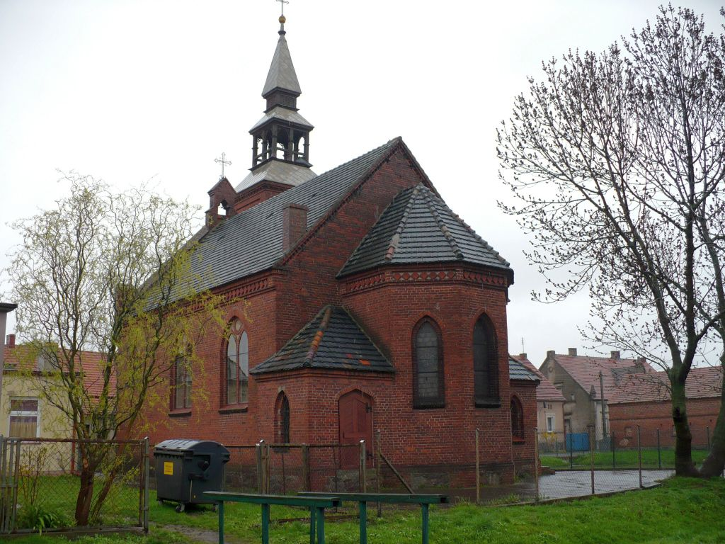 Kościół w Dabrówce Małej